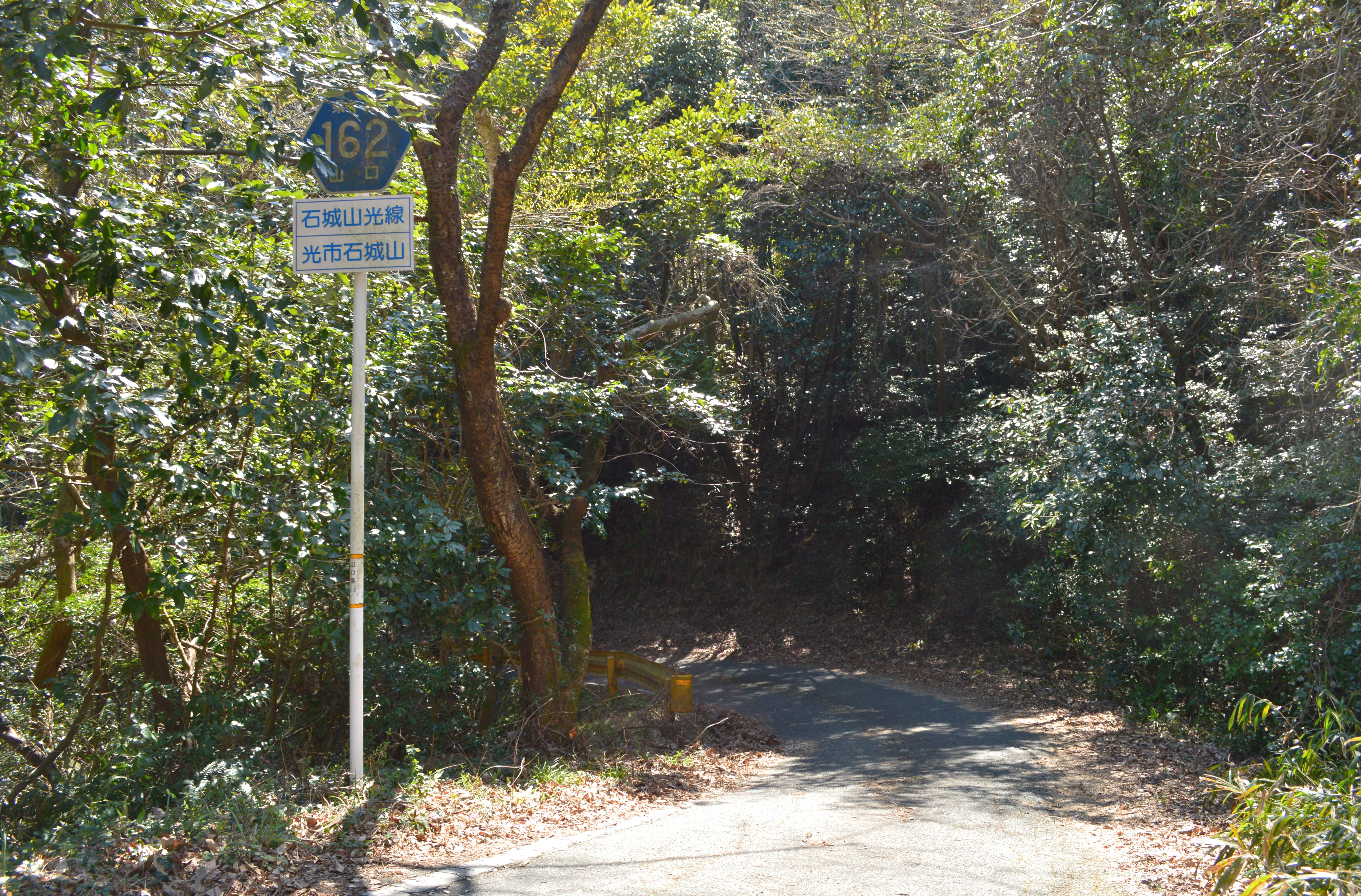 山口県道162号線 (石城山中)